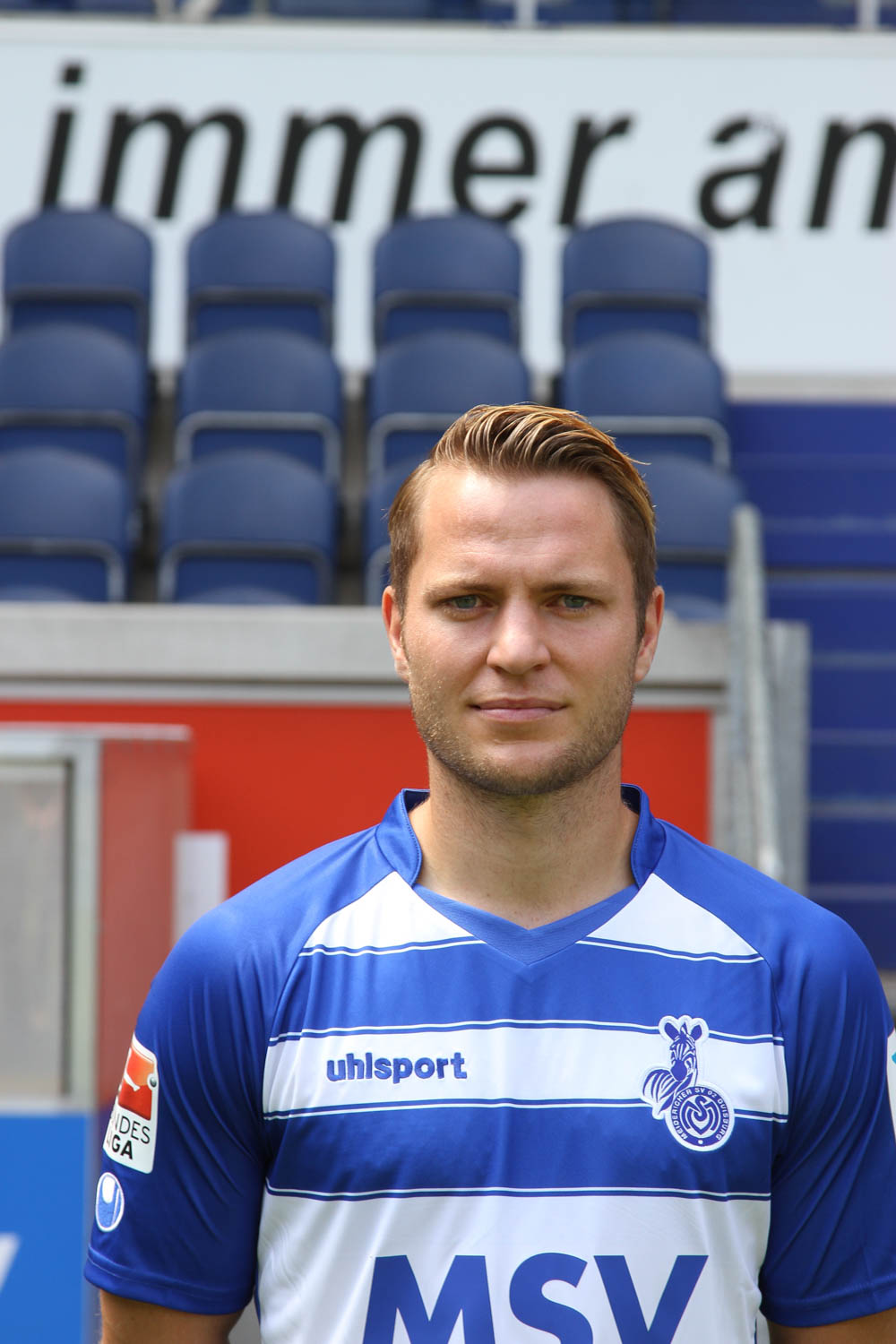 Martin Dausch 2015